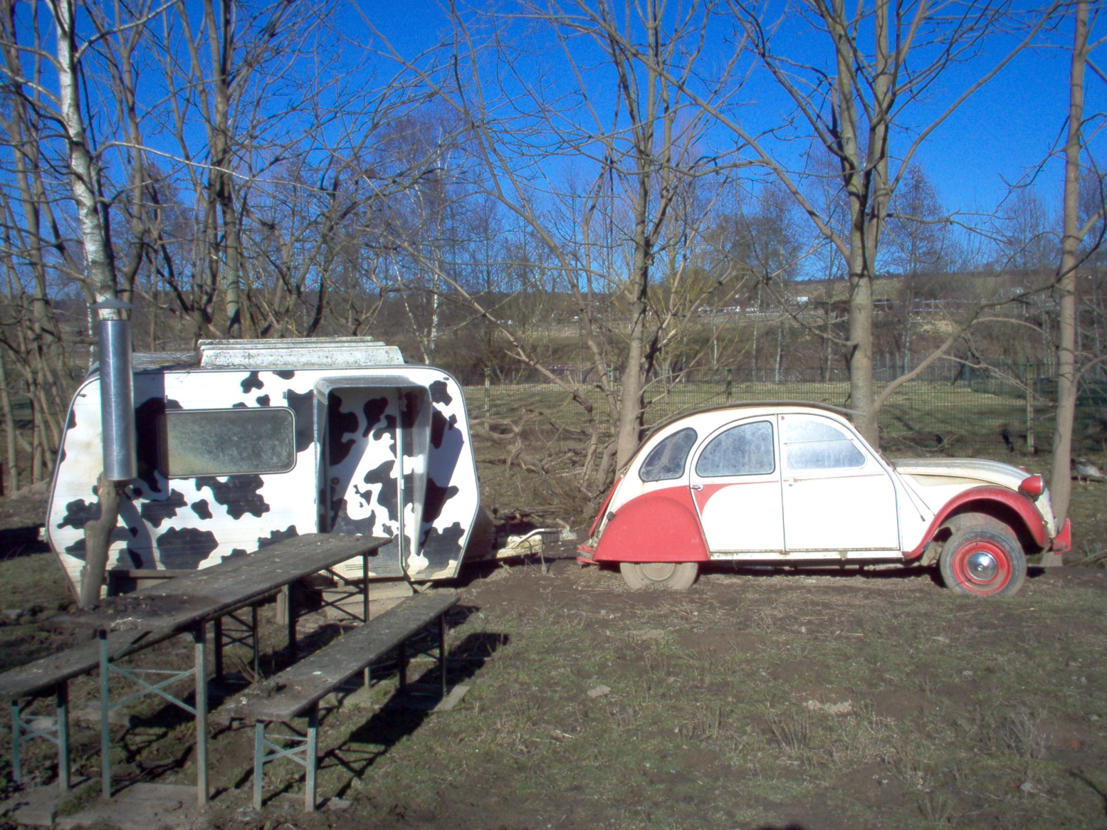 Gehege der Nasenbären